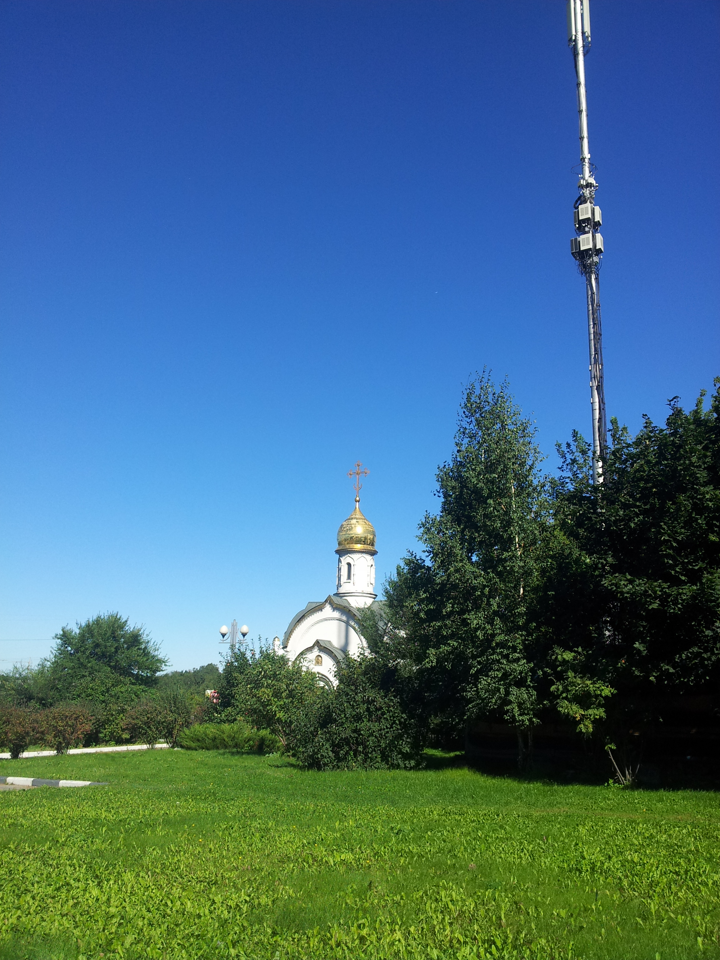 ул. Нерис Саломеи 14 - Часовня Феодоровской иконы Божией Матери в Братцеве на месте крушения вертолёта Святослава Фёдорова